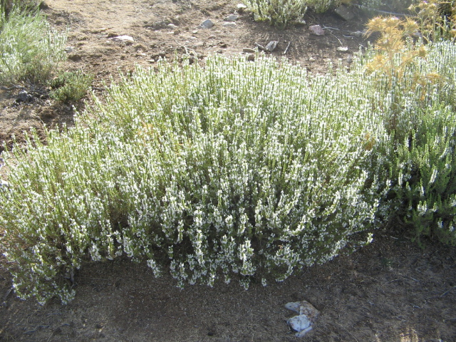 kekik